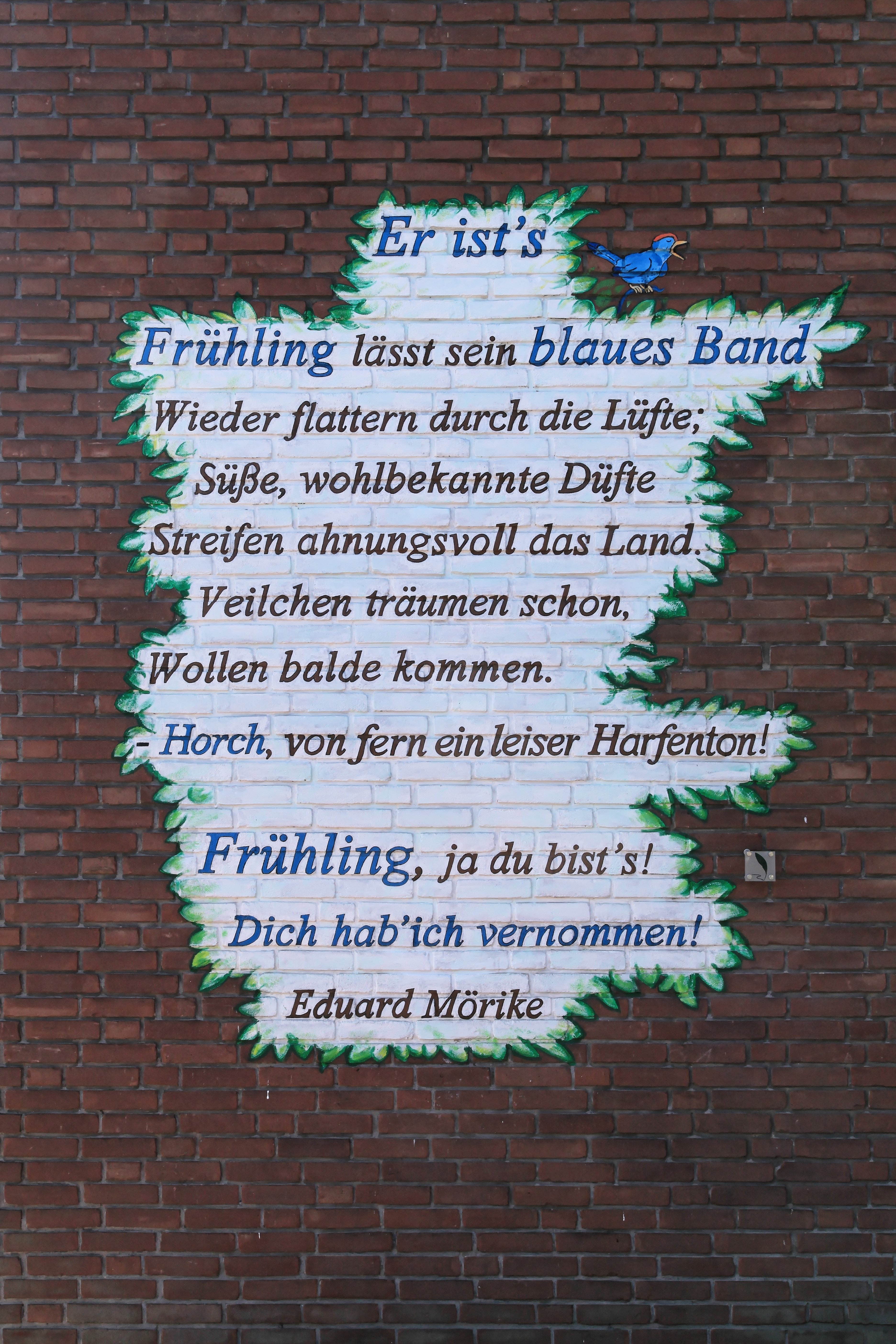 Mauergedicht an Haus Mühlenstraße 15 in Sögel